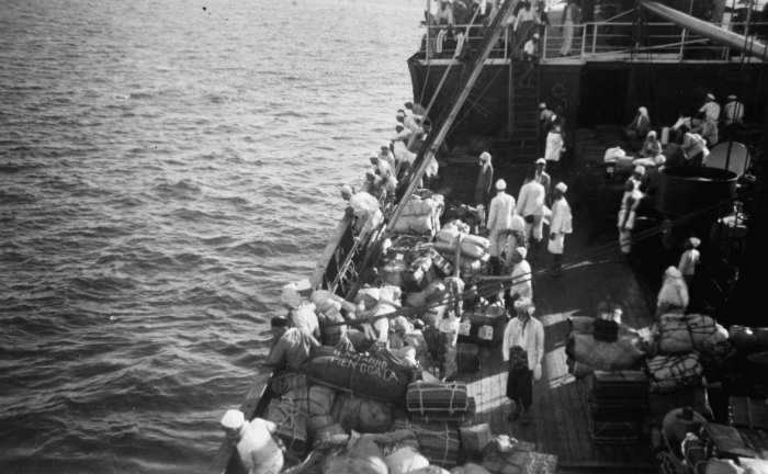 Deze foto is gemaakt aan boord van ms. "Kota Nopan" van de Rotterdamsche Lloyd dat op 19 september 1937 was vertrokken uit Belawan, de haven bij Medan. Waarschijnlijk bevond het schip zich ergens in de Rode Zee op het moment dat deze foto gemaakt werd. Aan boord veel hadji's (hajs) op weg naar Mekka en andere passagiers, onder wie mej. M.E. Wenckebach, op weg naar Nederland.